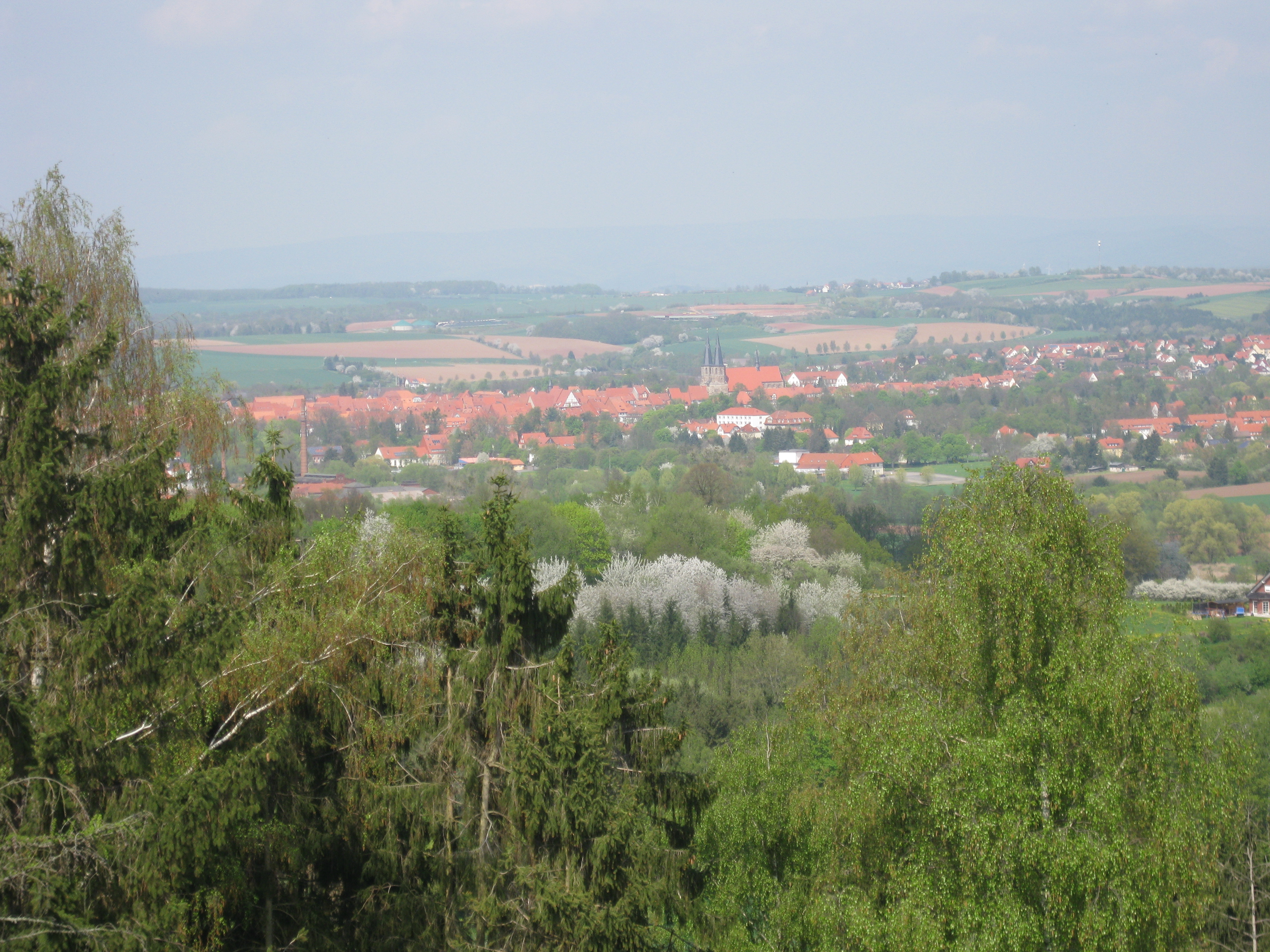 Blick vom Pferdeberg auf Duderstadt